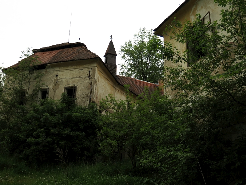 Zámek Poříčí, Poříčí (Boršov nad Vltavou) 196, Boršov nad Vltavou.